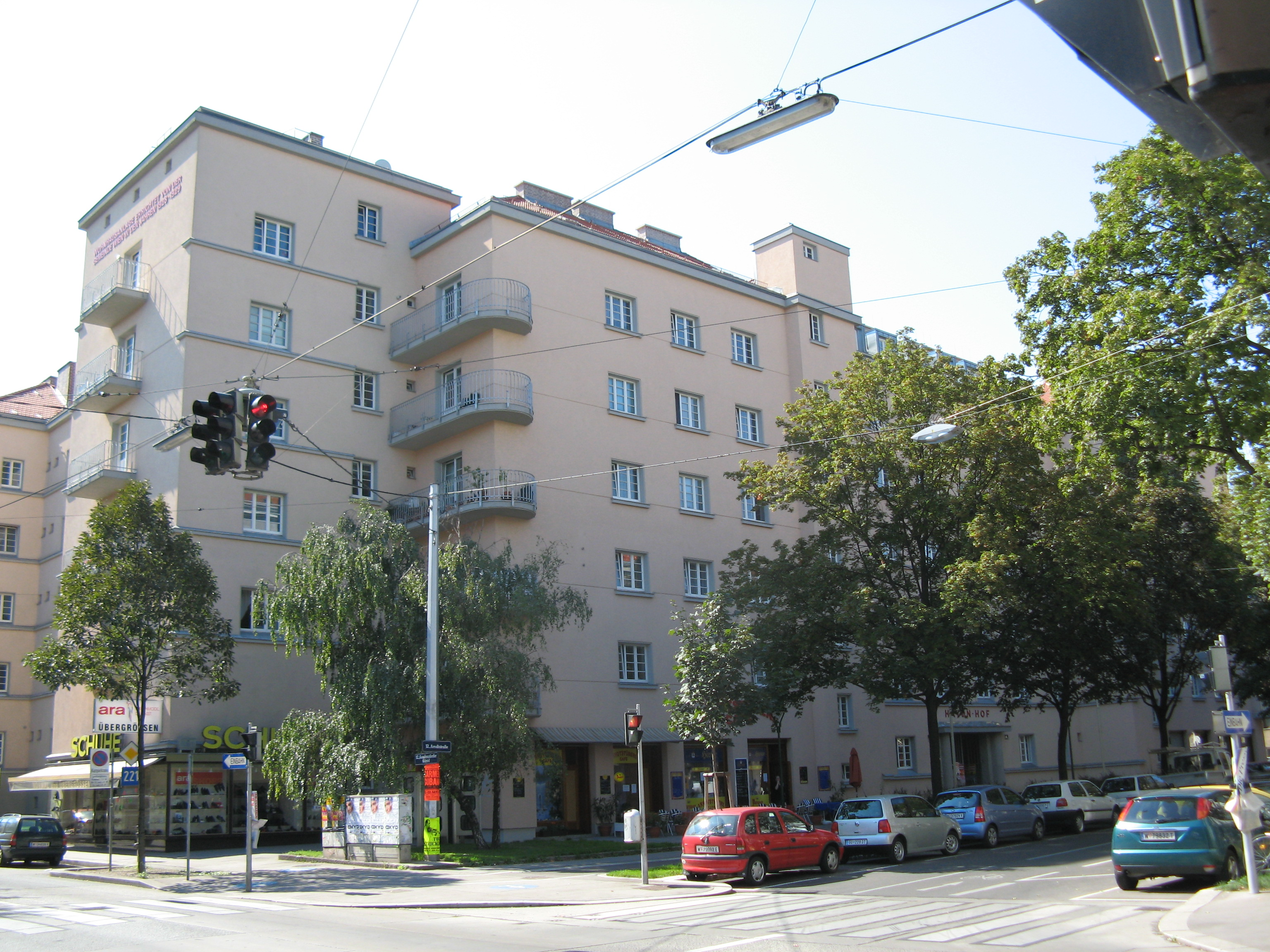 Wohnhausanlage Haydnhof von A. Hauser, 1928-29, in Wien-Meidling